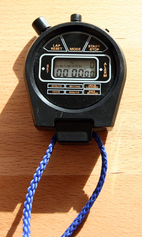 Einfache digitale Stoppuhr/ Simple digital Stopwatch